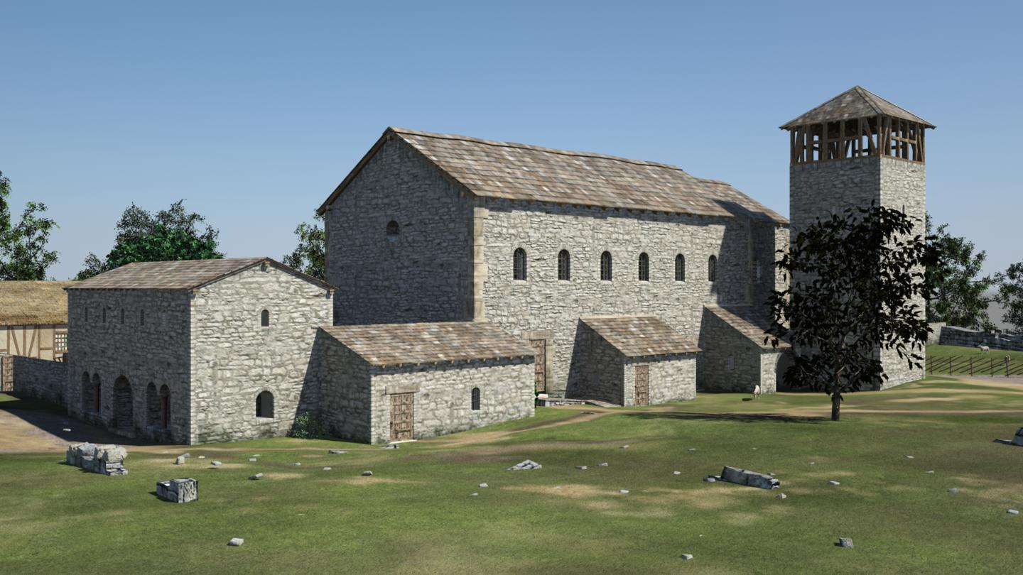 Virtuelle Idealrekonstruktion der Niedermünsterkirche zur Zeit der Karolinger.